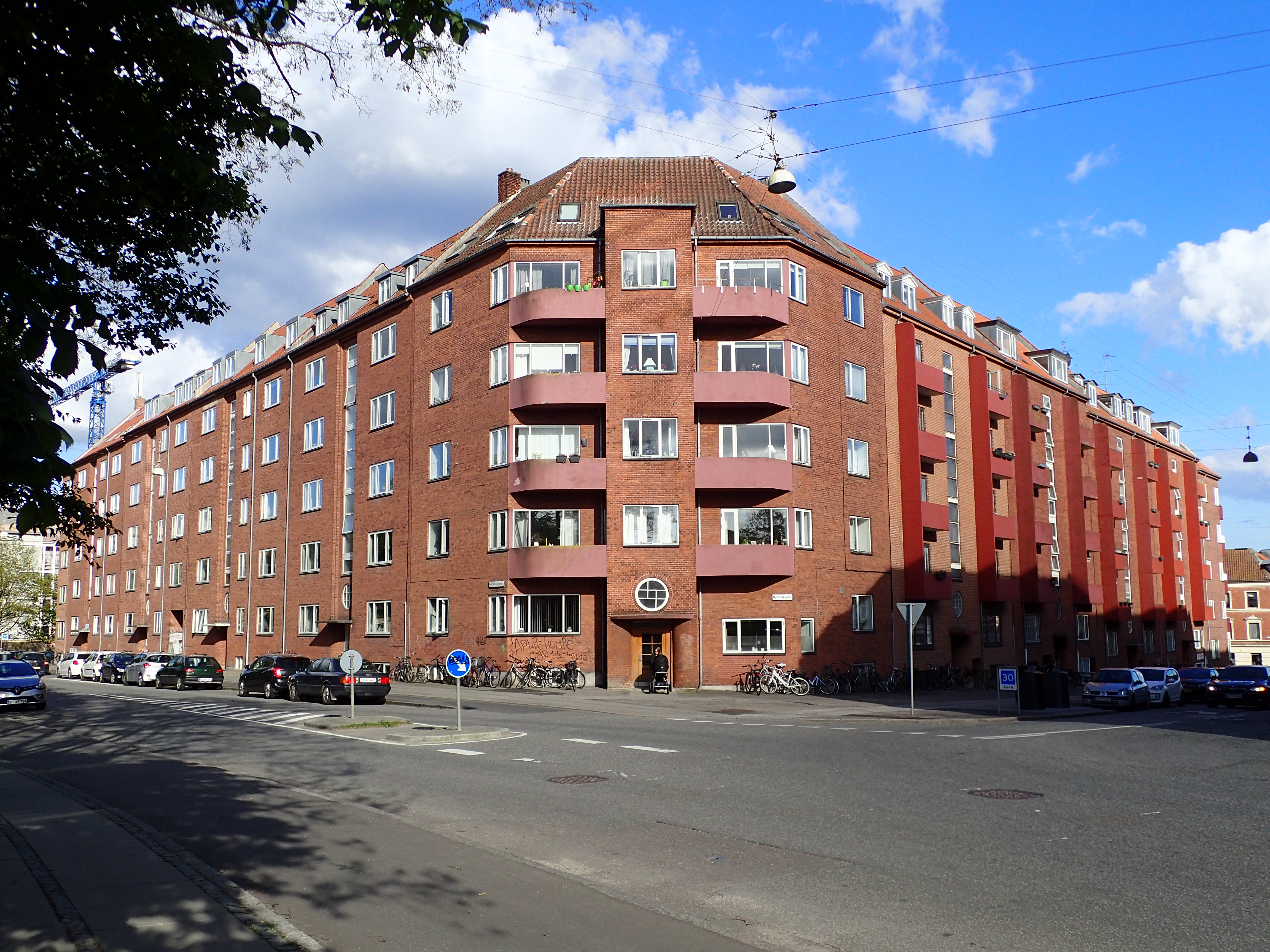 Bakkegaarden, lejlighedskompleks på Vesterbro i Aarhus. Bygget i 1935-38. Dansk funktionalisme.